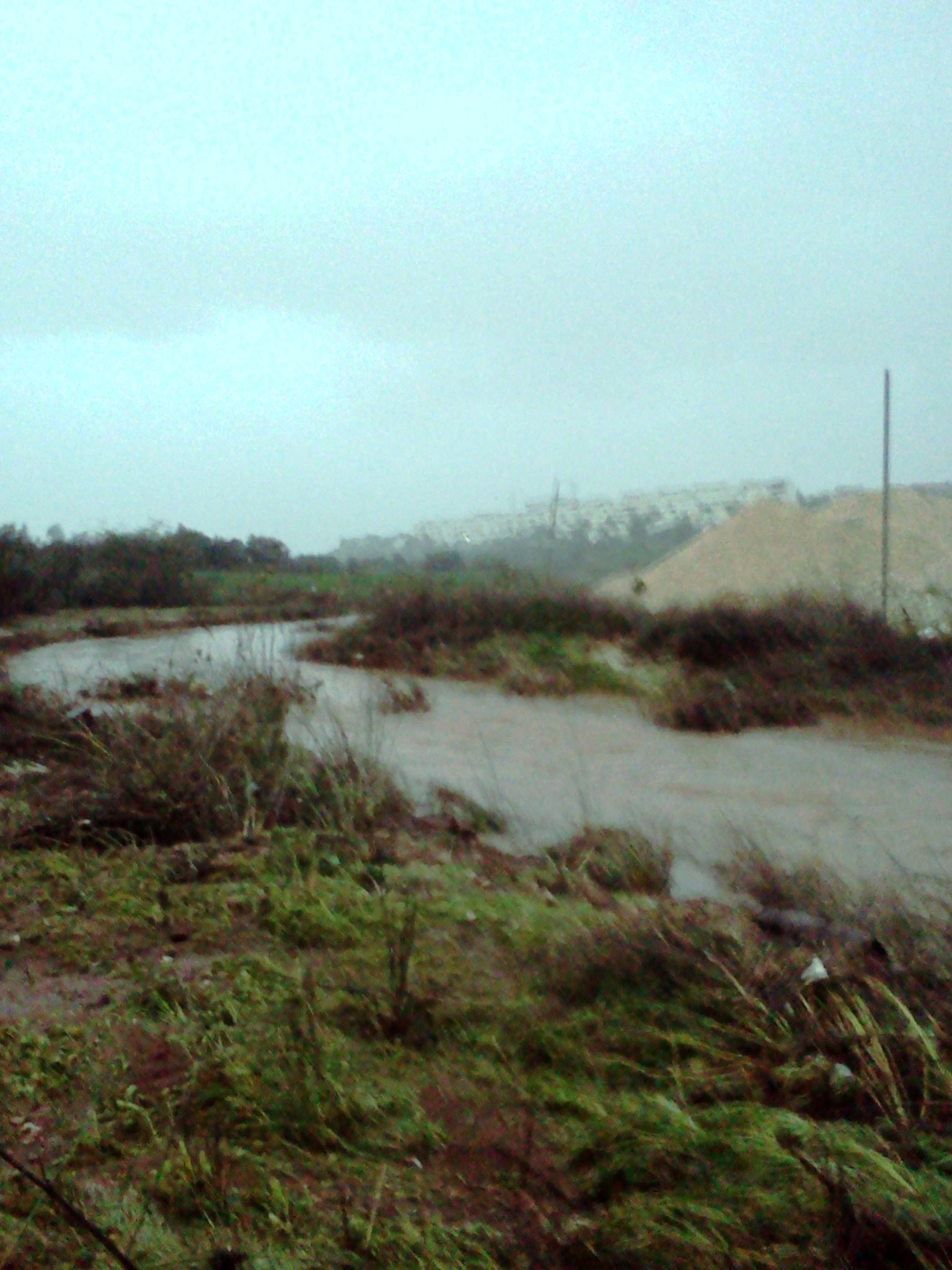 נחל בית עריף בעקבות גשם חזק